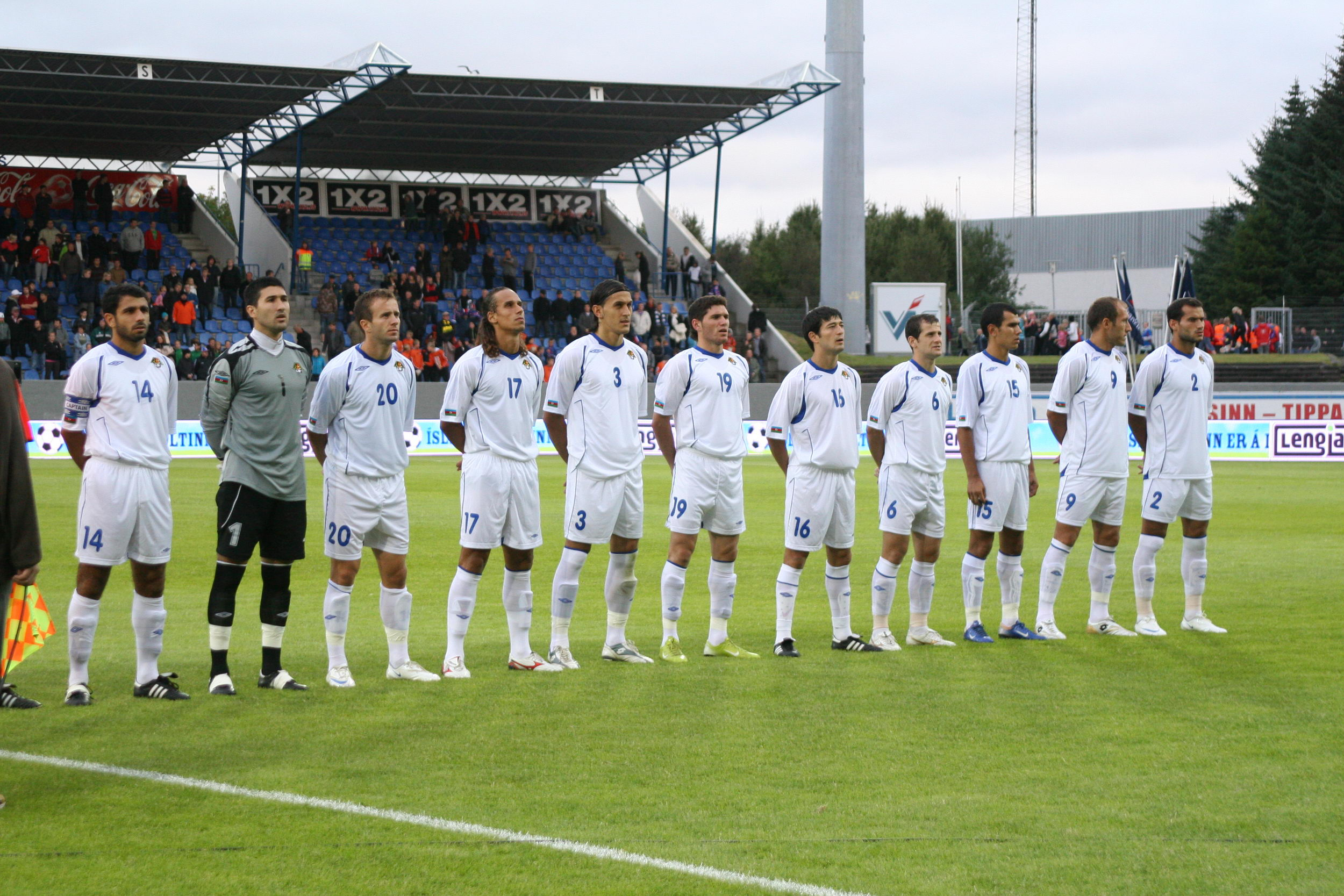 İslandiya-Azərbaycan yoldaşlıq görüşü